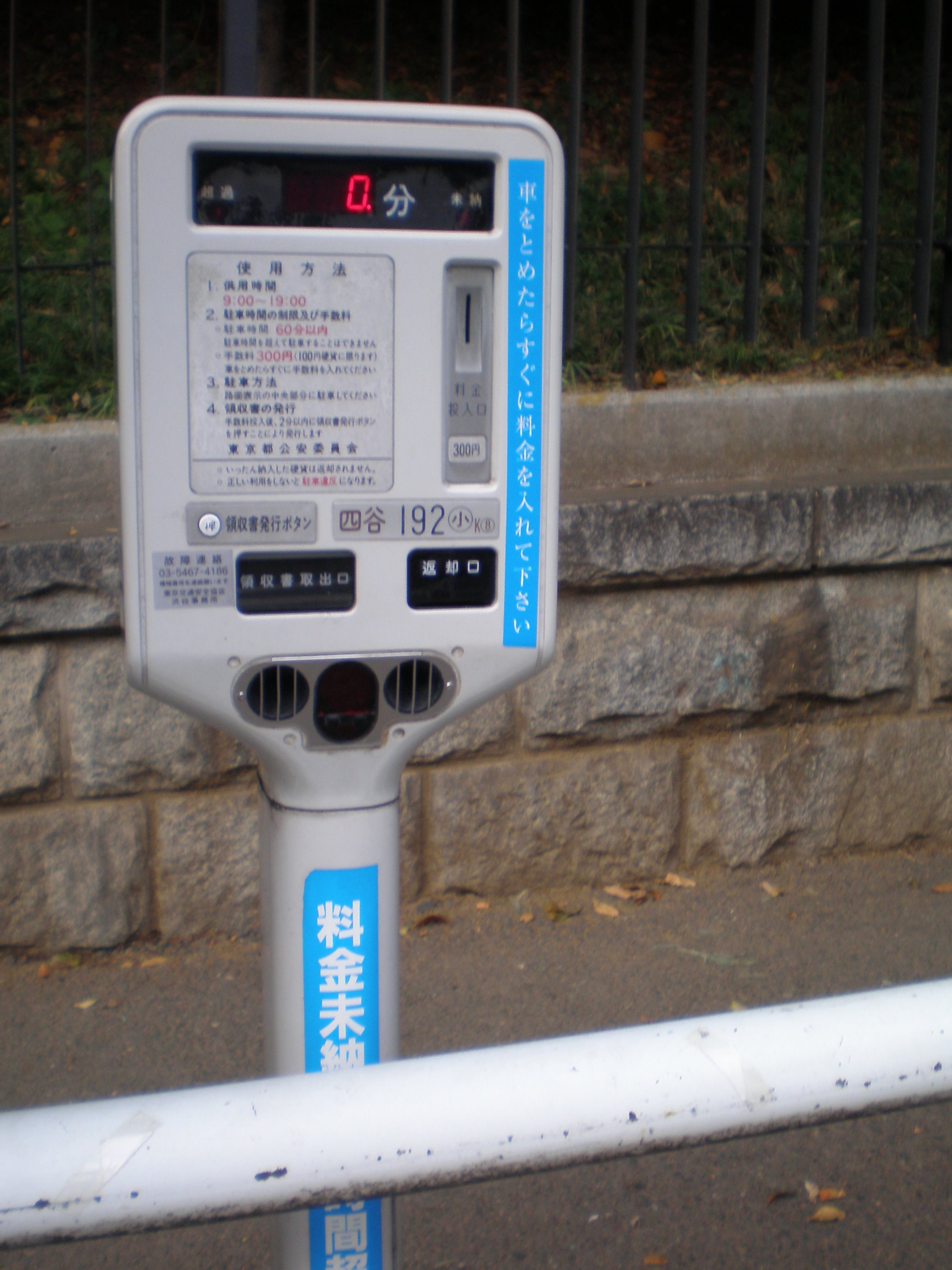 Parking Meter in Tokyo, Japan